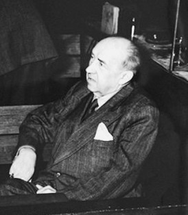 Walther Funk, der ehemalige Reichswirtschaftminister und Präsident der Reichsbank, auf der Anklagebank bei den Nürnberger Kriegsverbrecherprozessen